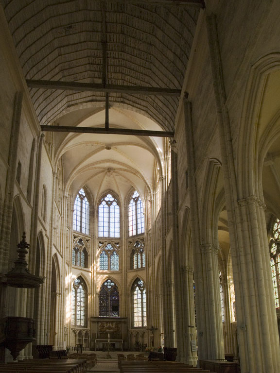 La toiture en bois et les voutes d'ogives de l'église Saint Sulpice de Favières